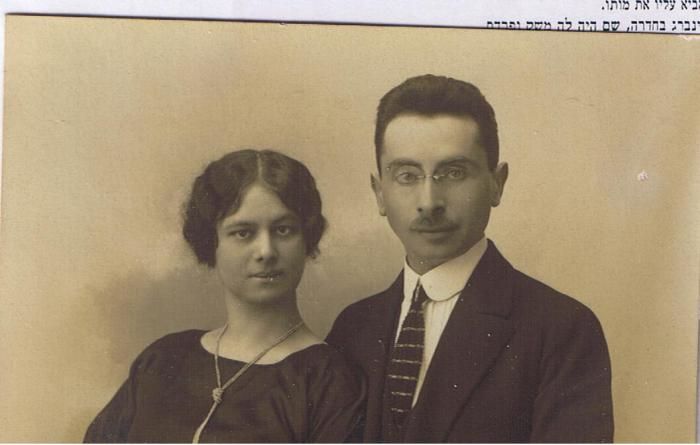 צילה בת לוליק ופאני פיינברג, אחותו של אבשלום פיינברג ובעלה זאב שוהם